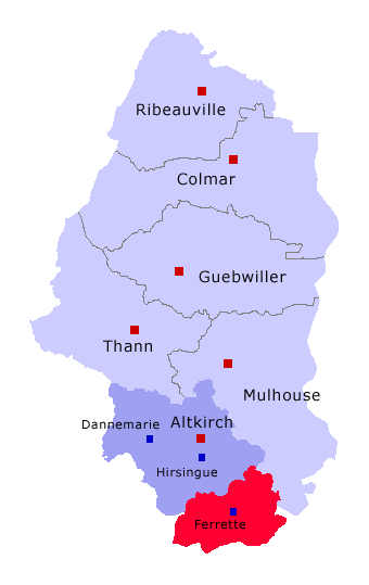 Lage von Kanton Ferrette im Arrondissement Altkirch und im Département Haut-Rhin Selbst erstellt von Benutzer: Jeanfrance Mai 2006